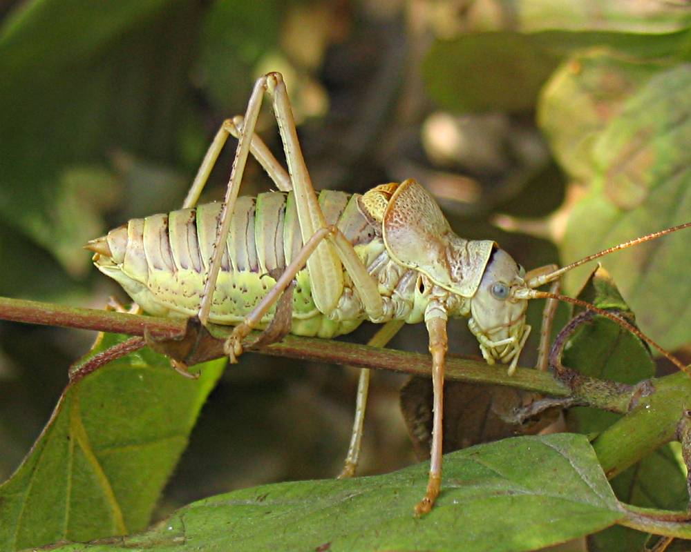 Männliche Steppen-Sattelschrecke (Ephippiger ephippiger) bei Wachenheim (Pfalz)